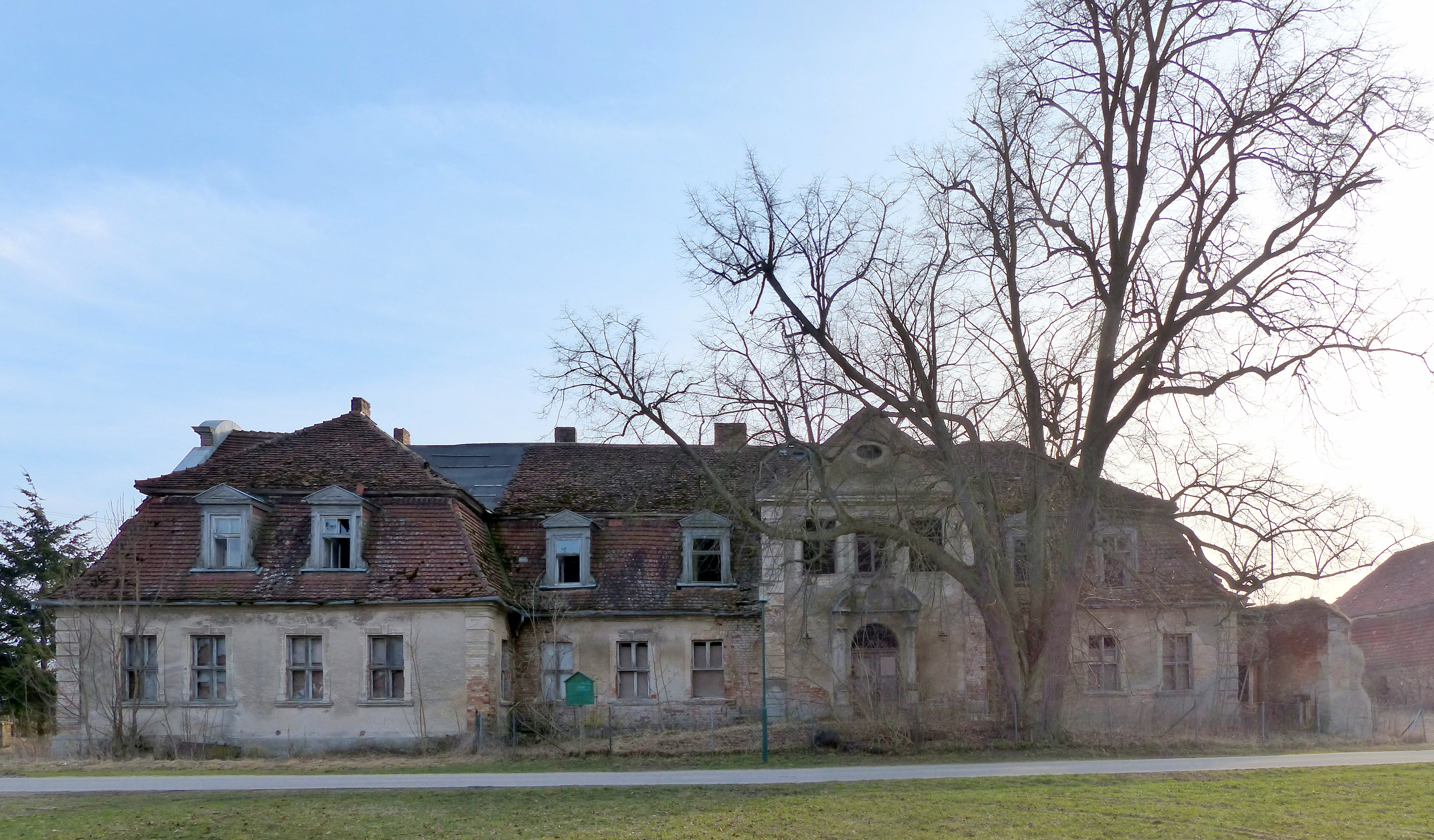 Gutshaus Dargibell, Nordostseite